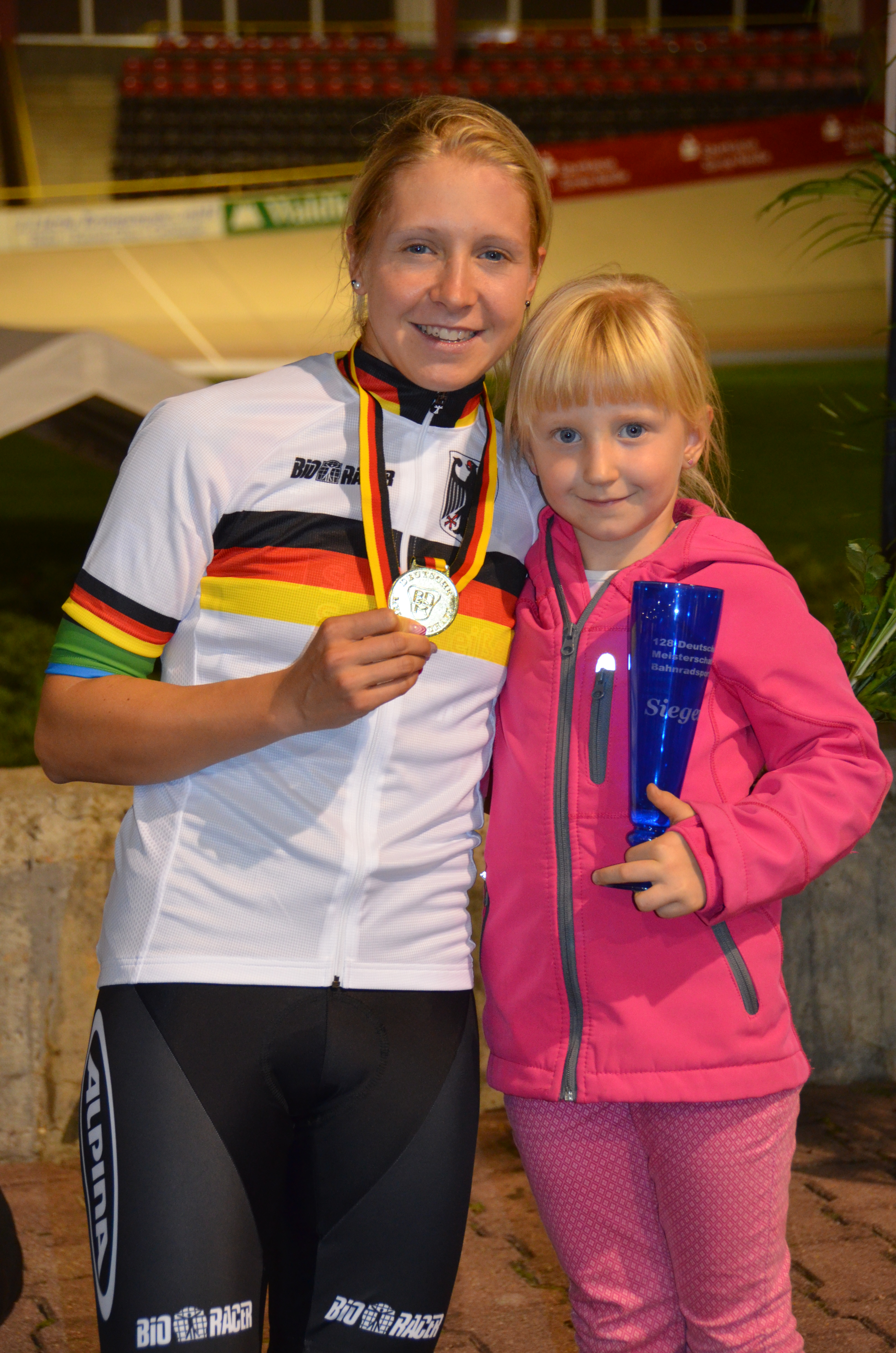 Stephanie Pohl, deutsche Radsportlerin The making of this document was supported by the Community-Budget of Wikimedia Germany.